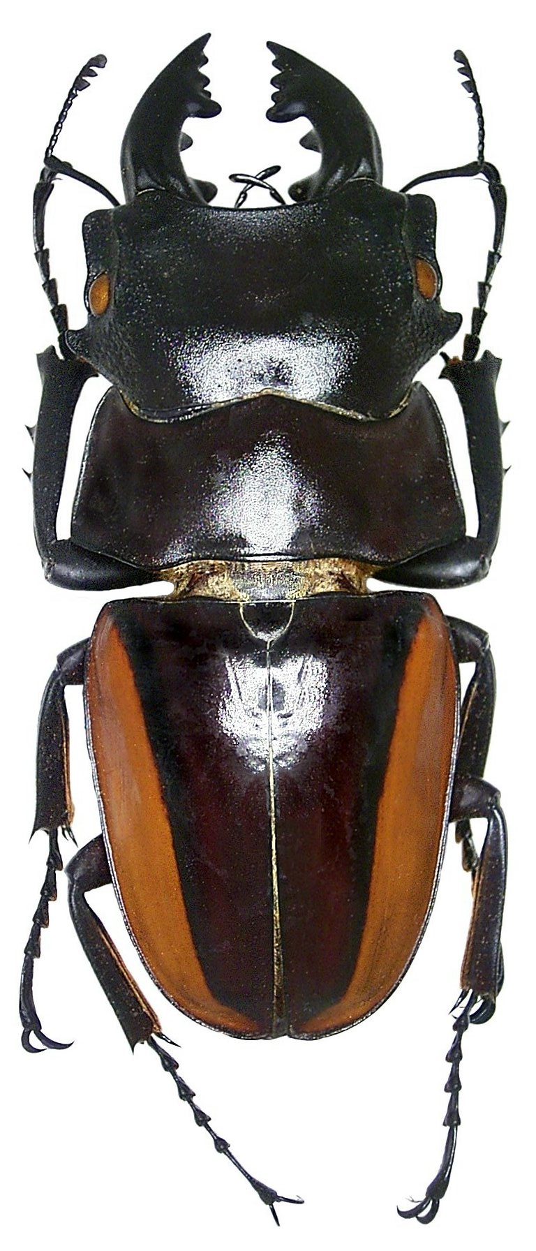 Familie: Lucanidae Groesse: 45-82 mm Fundort: Indonesien, Sulawesi, 2006 det. A.Skale, 2006 Photo: U.Schmidt, 2006